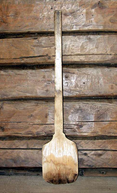 Ystespade fra Kvam i Oppland. Lengde 102 cm. Norsk Folkemuseum, NF.1914-0312.